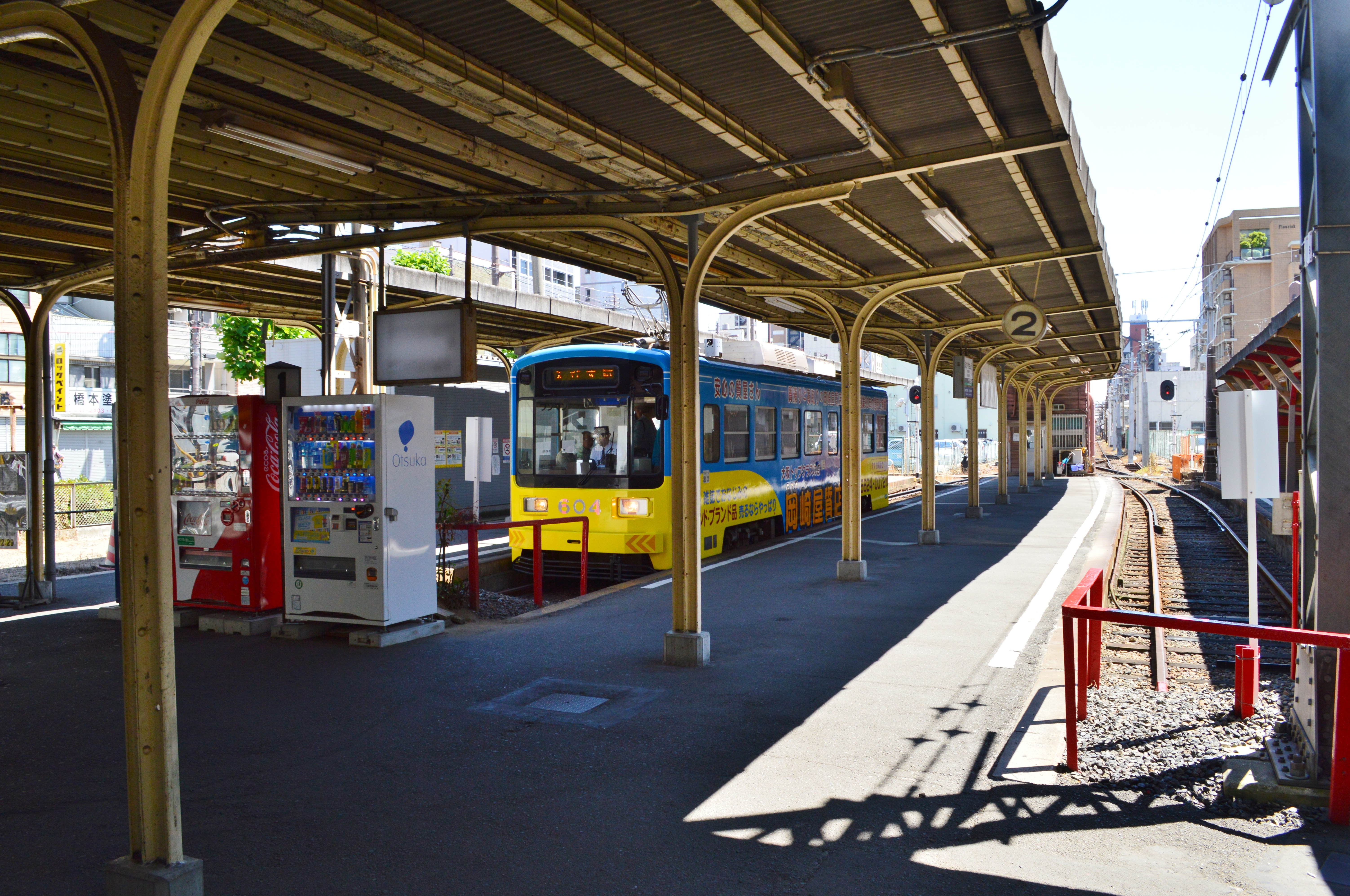 恵美須町駅 (阪堺線) ホーム